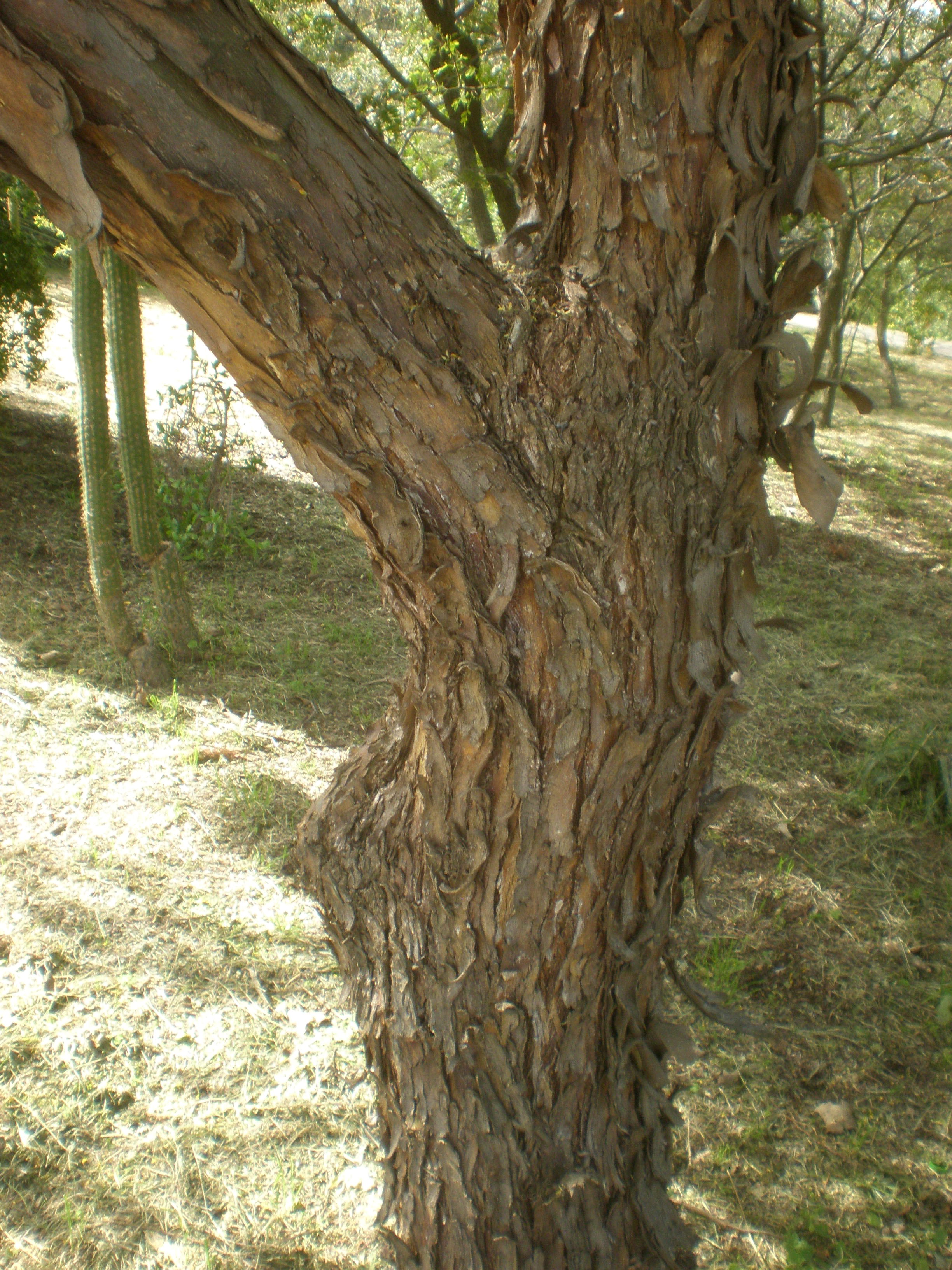 Tronco de Geoffroea decorticans.